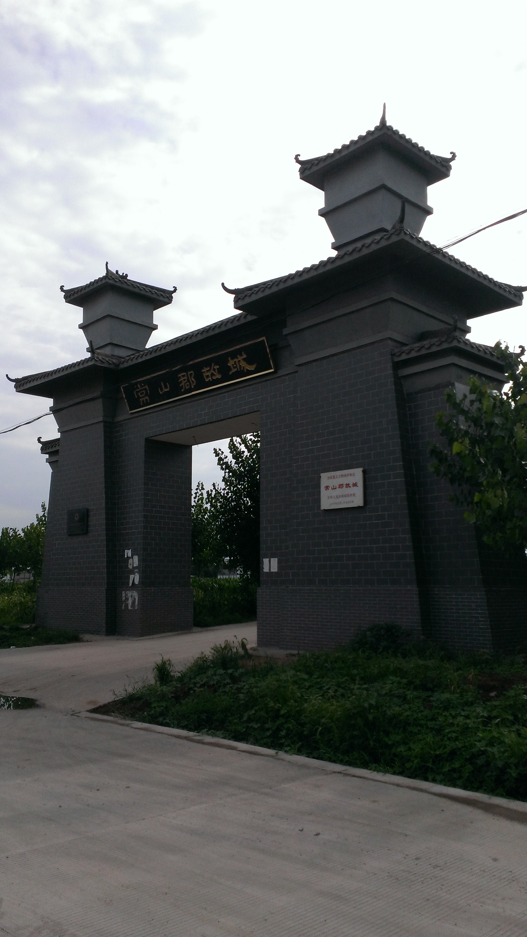 中文（中国大陆）: 常山郡故城遗址位于石邢公路的入口